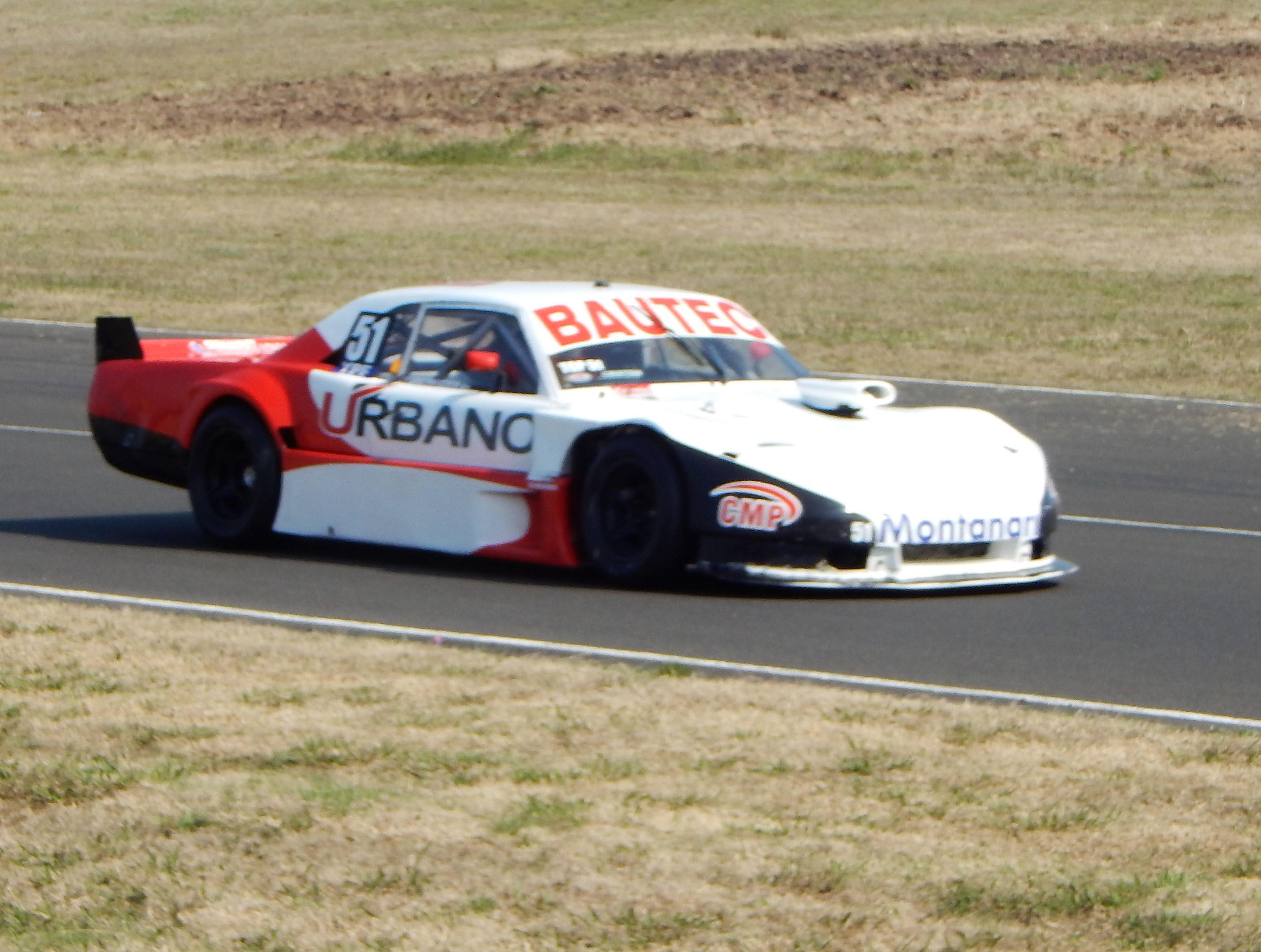 Tomás Urretavizcaya Paraná 2015